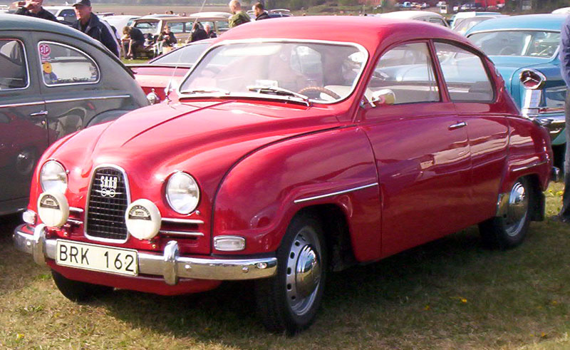 SAAB 96 De Luxe 2-Door Sedan 1962